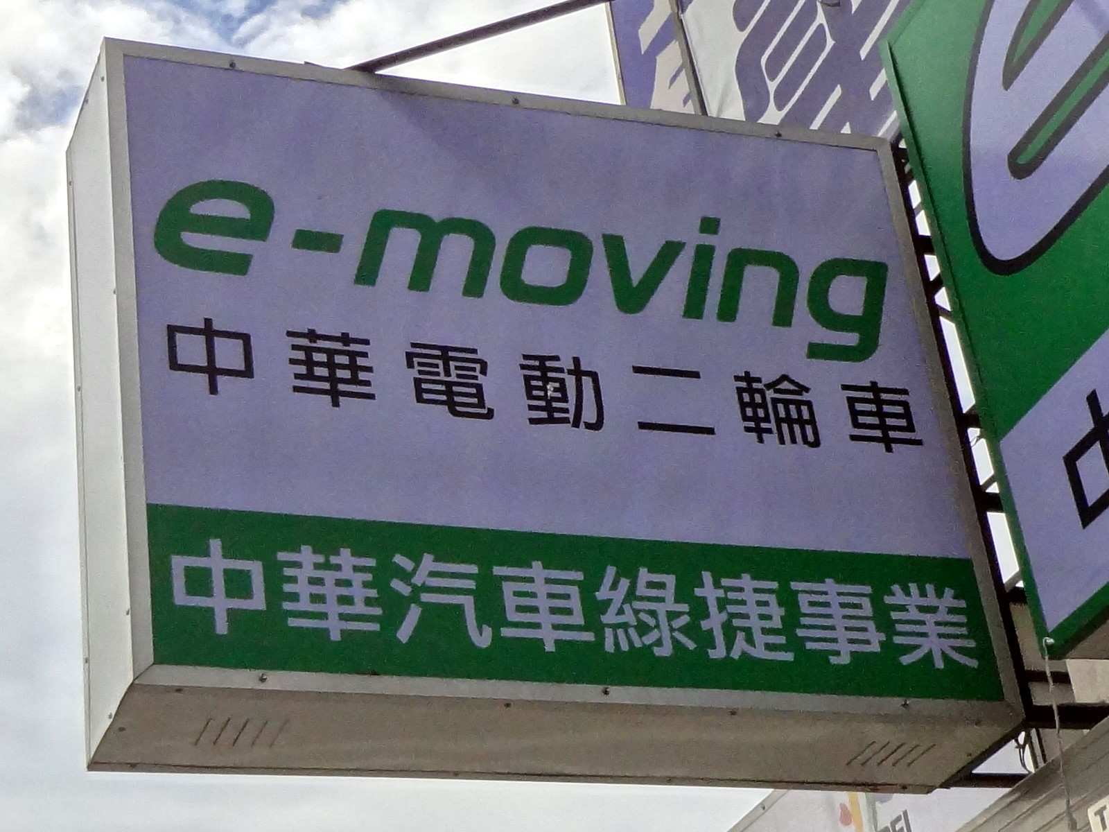 中文（台灣）: 中華汽車電動二輪車經銷店招牌。